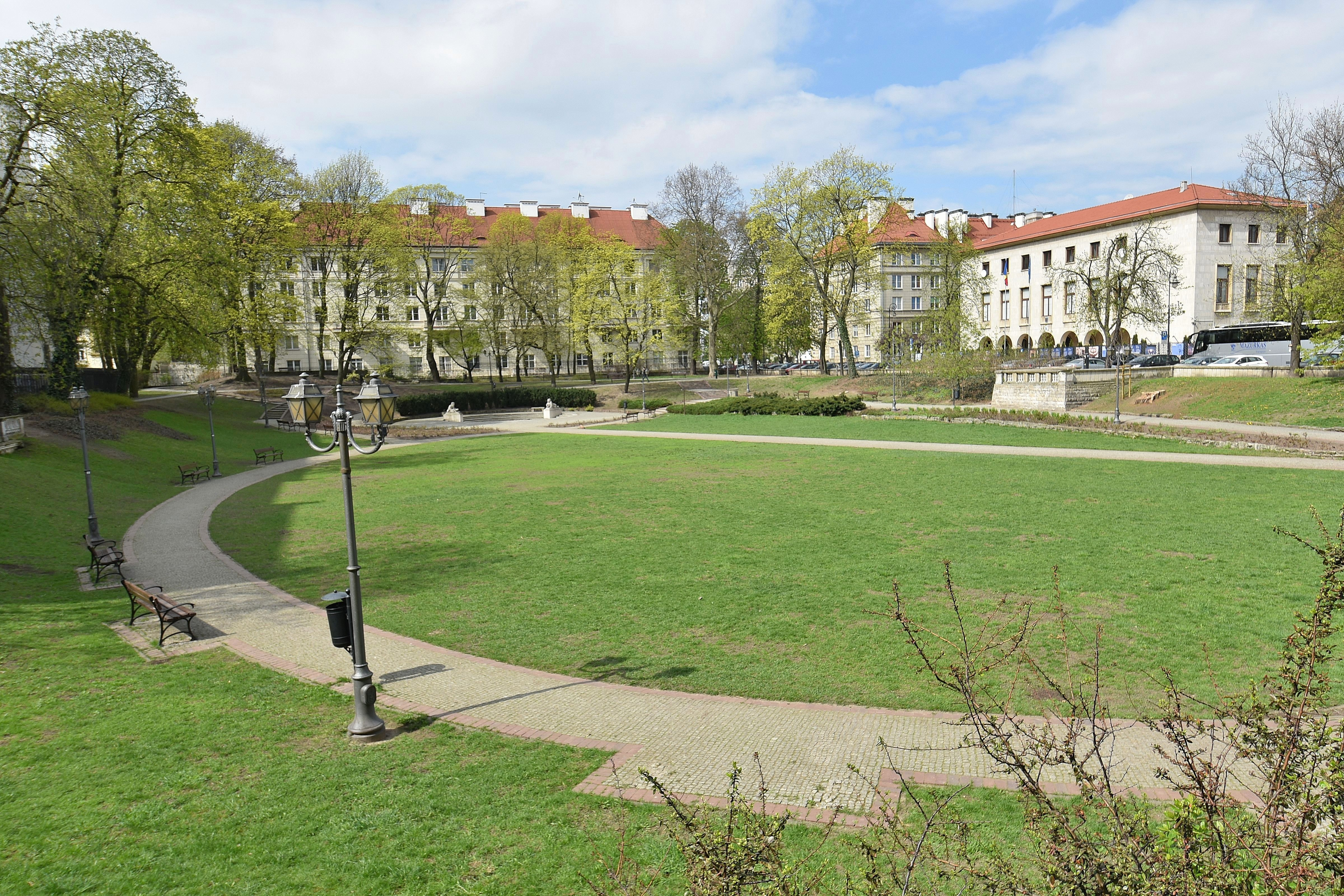 Park Dolina Szwajcarska w Warszawie